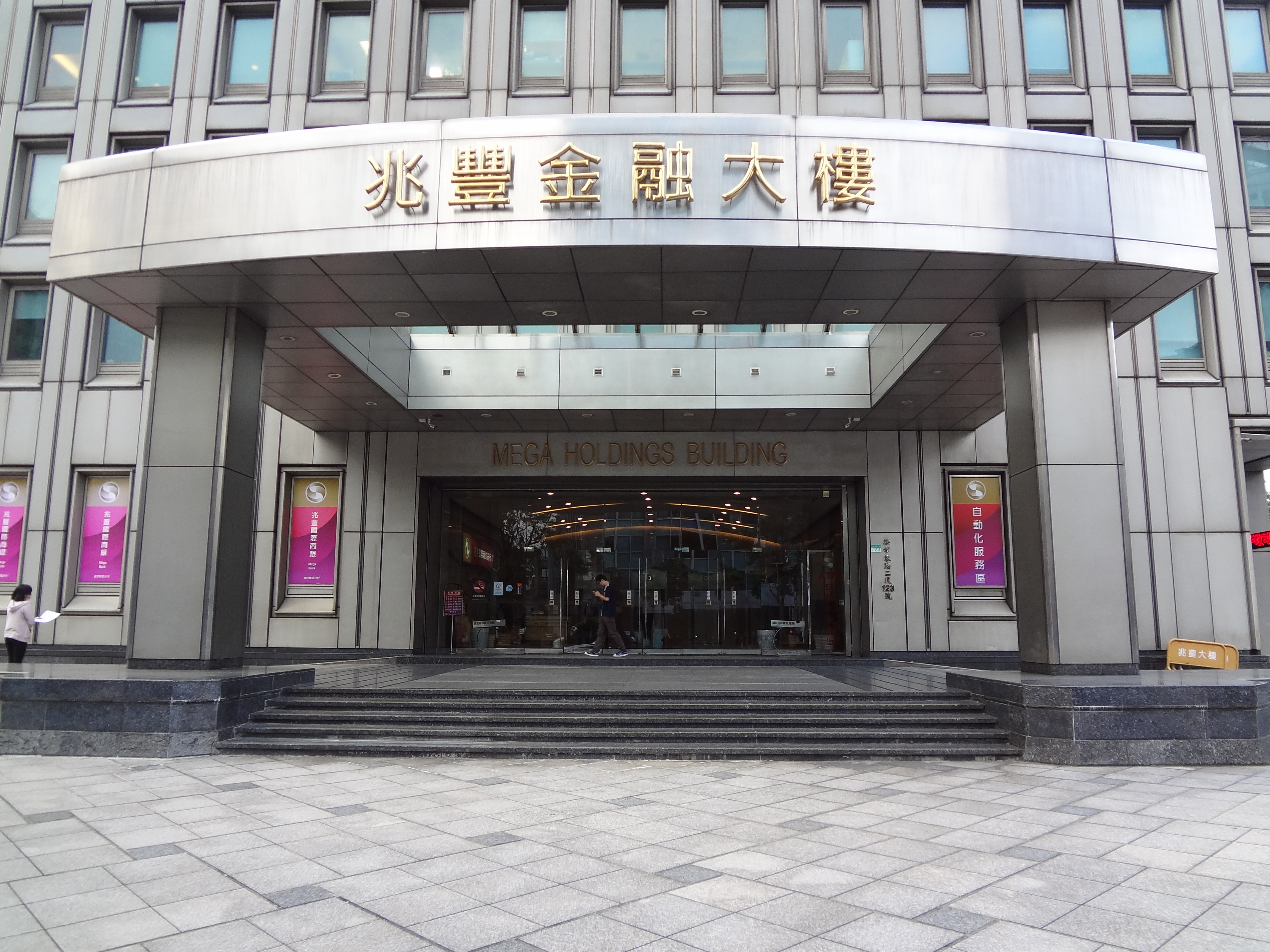 兆豐金融大樓大門，朝向臺北市中正區忠孝東路二段。